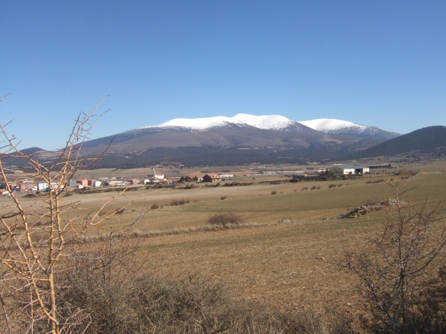 Vista de Ólvega, Moncayo al fondo